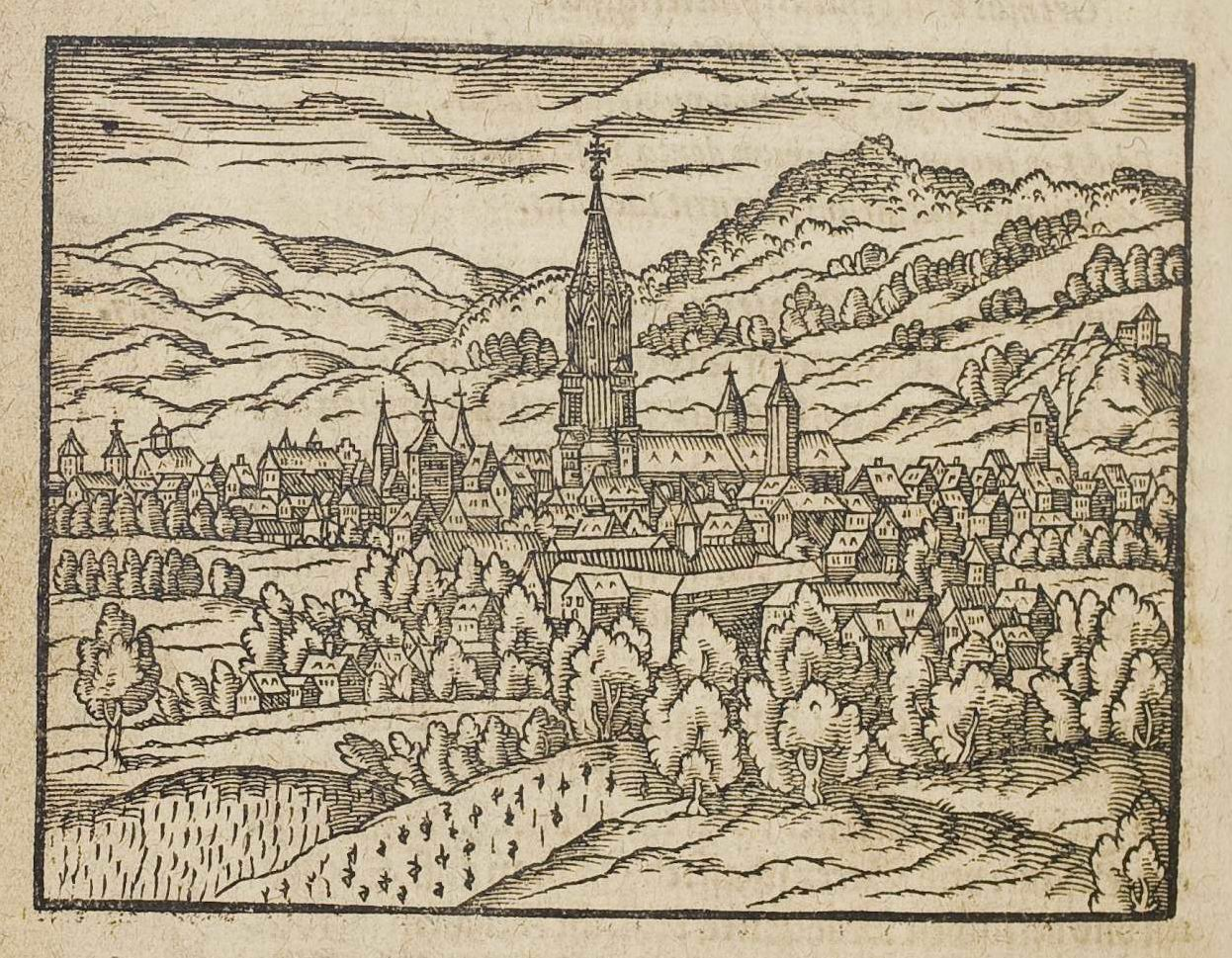 from: Abraham Saur: Theatrum Urbium. Warhafftige Contrafeytung/ und Summarische Beschreibung/ fast aller vornemen und namhafftigen Stätten/ Schlössern und Klöster ..., Frankfurt : Richter, 1610 (Erstausgabe: 1593)